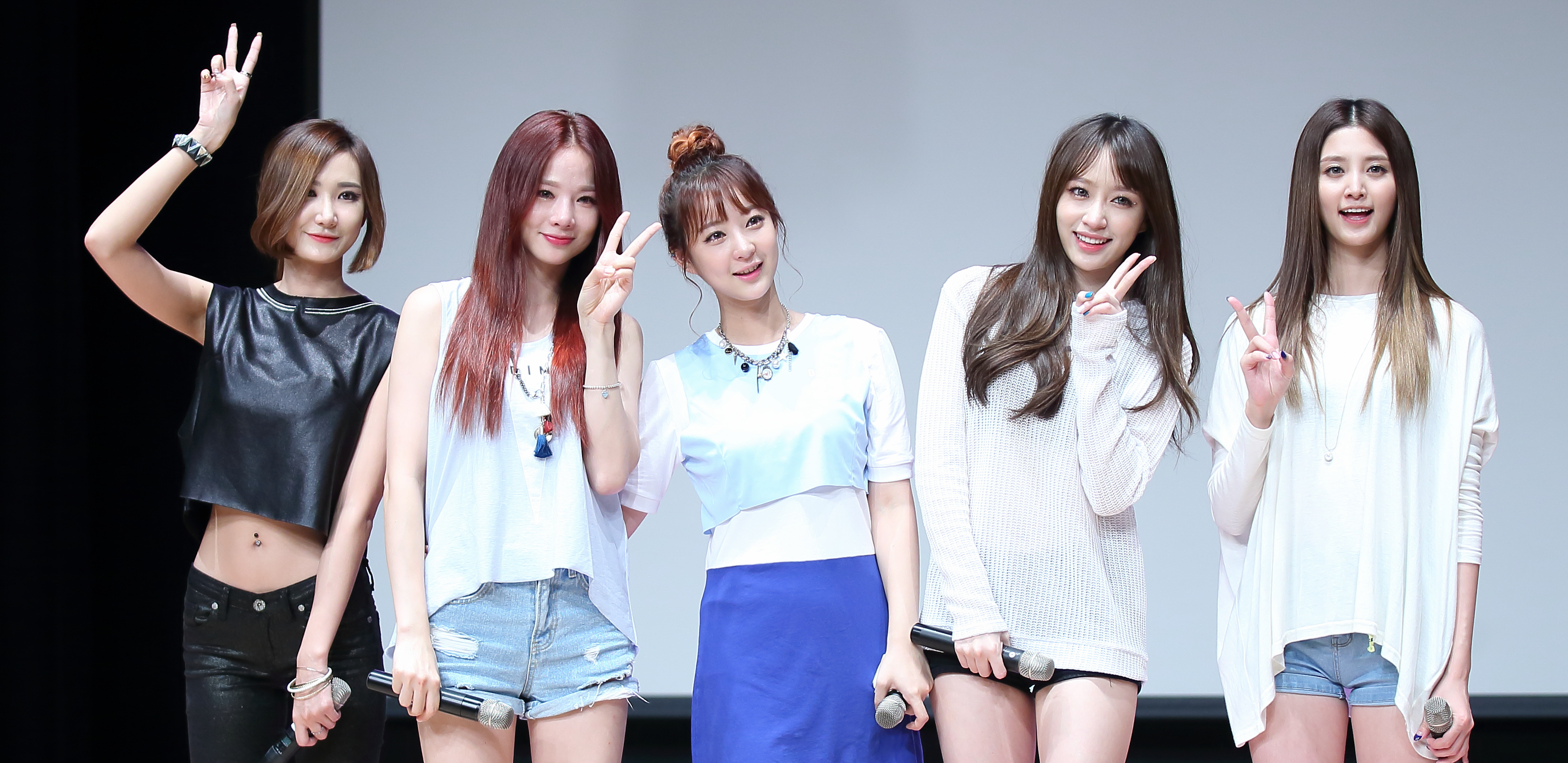 EXID 쇼케이스&팬미팅